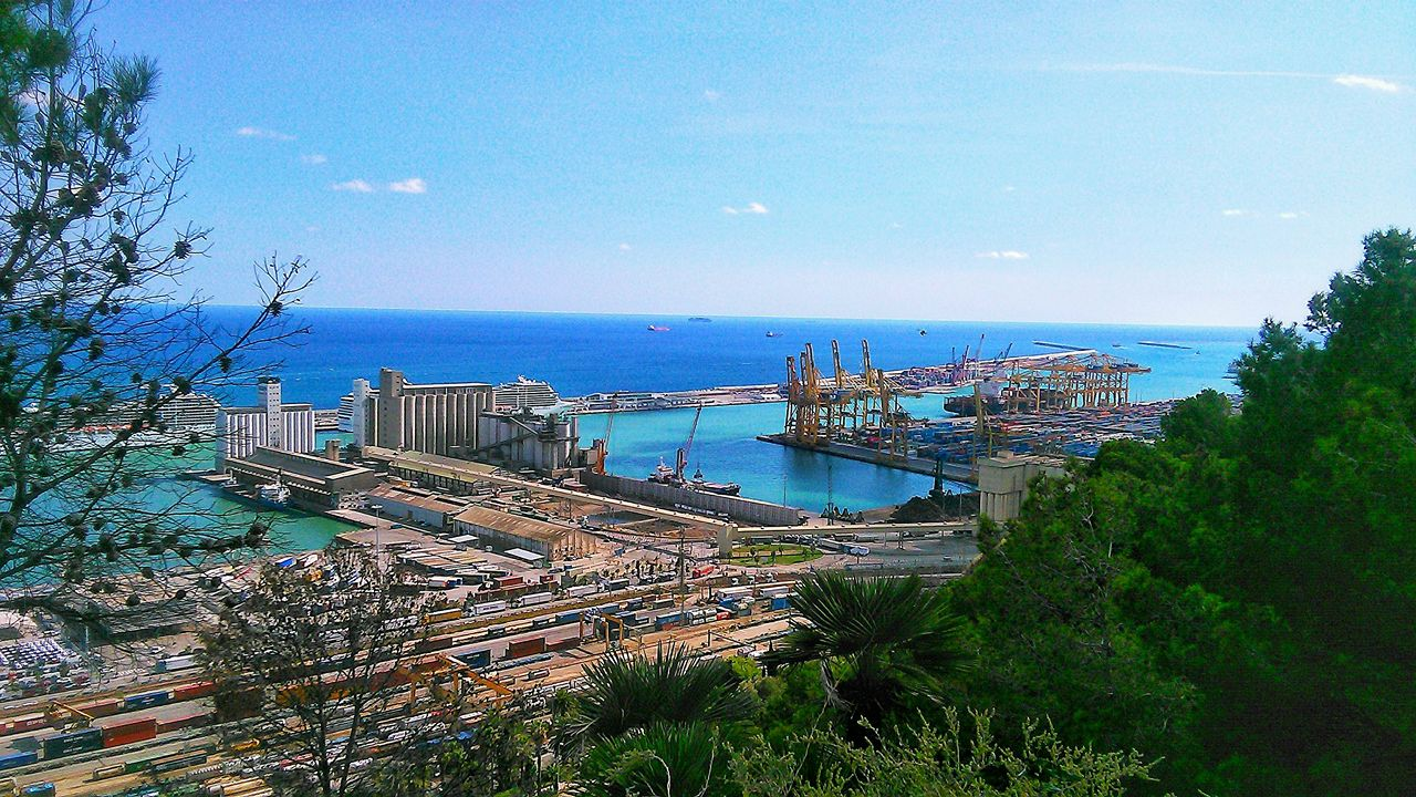 Српски (ћирилица): Поглед на луку у Барселони